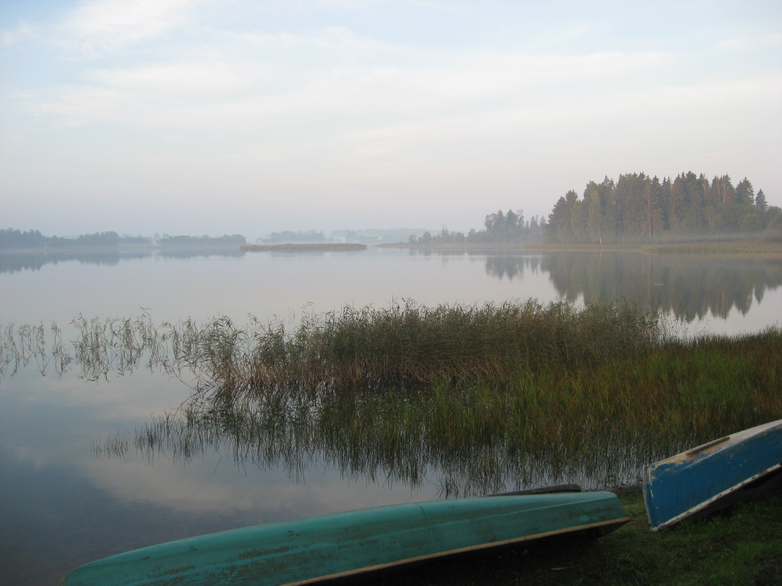 Rītausma pie Adamovas ezera